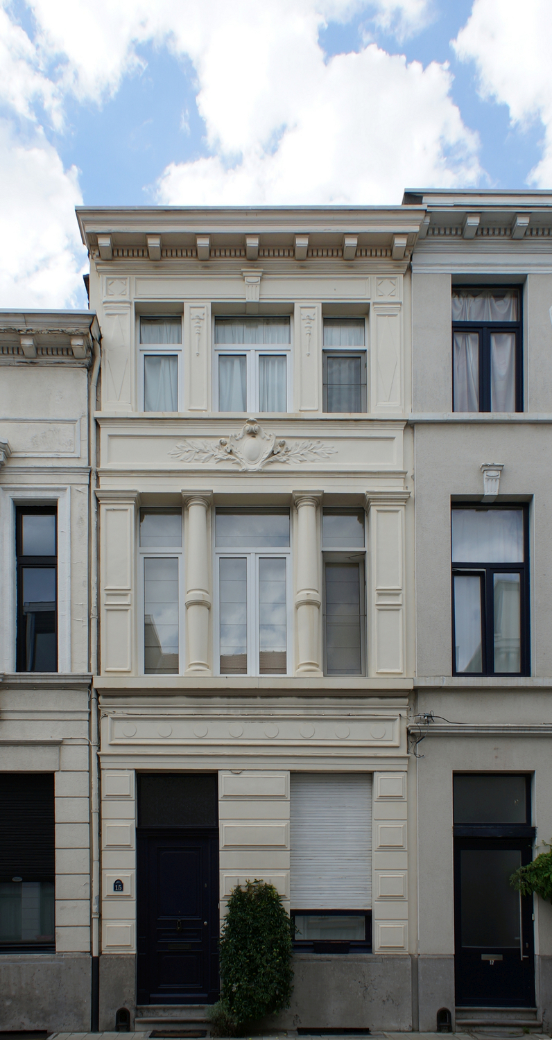 Antwerpen, Dolfijnstraat 15 - Enkelhuis in neoclassicistische stijl, ontworpen door architect Ernest Dieltiens